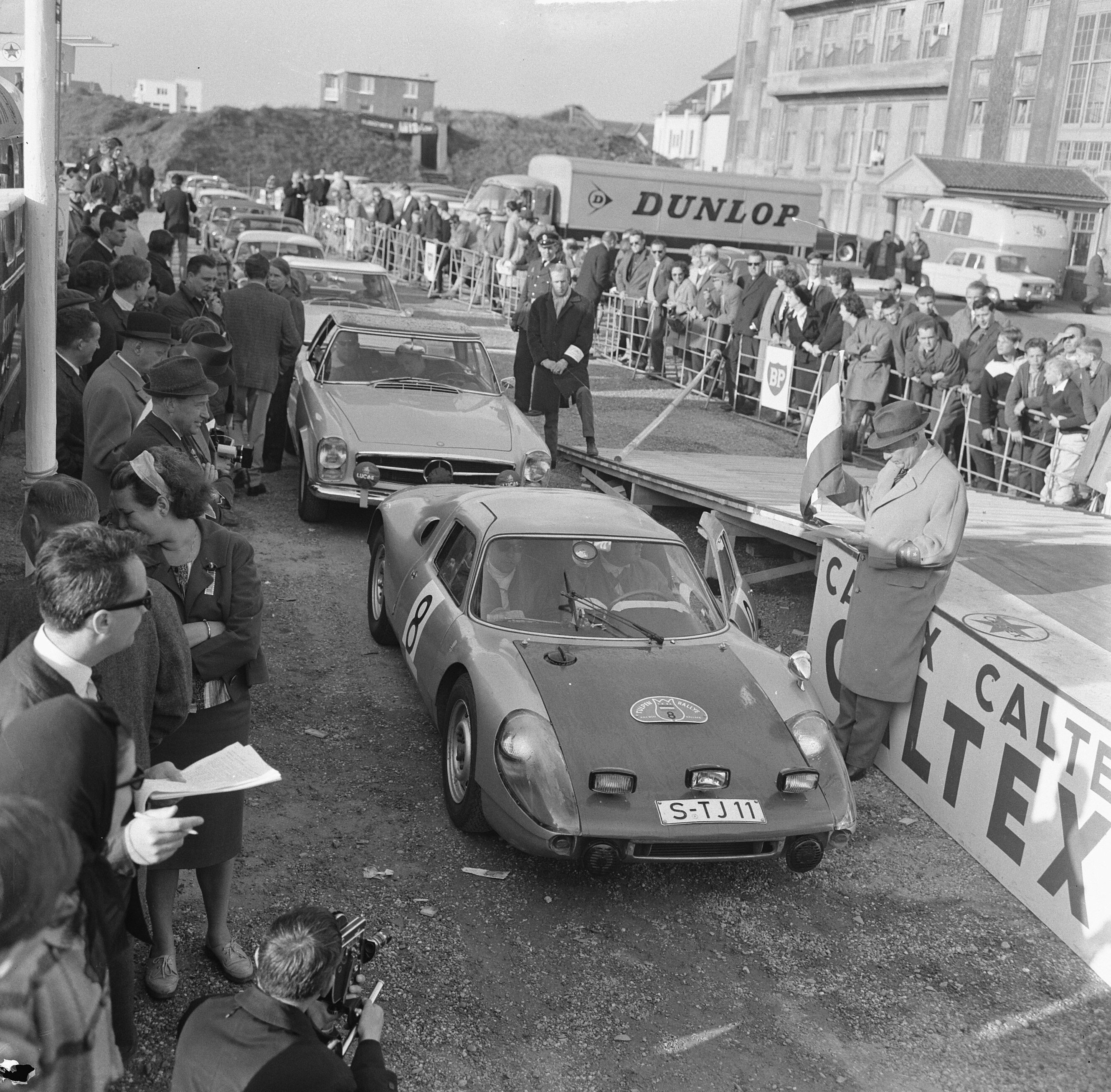 Collectie / Archief : Fotocollectie Anefo Reportage / Serie : [ onbekend ] Beschrijving : 16e Tulpen Rally gestart in Noordwijk, Ben Pon (8) met zijn bijrijder Rolf wutherich gaat van start Datum : 21 april 1964 Locatie : Noordwijk Trefwoorden : auto's Persoonsnaam : Ben Pon Instellingsnaam : Tulpenrally Fotograaf : Nijs, Jac. de / Anefo Auteursrechthebbende : Nationaal Archief Materiaalsoort : Negatief (zwart/wit) Nummer archiefinventaris : bekijk toegang 2.24.01.03 Bestanddeelnummer : 916-3286